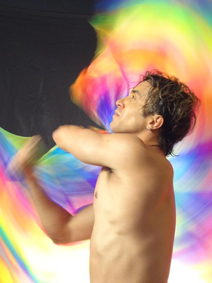 Exemplo de Flagger. Foto tirada no Estúdio Tuta Veloso em Fort Lauderdale, em 2011. Modelo: Clênio Machado.